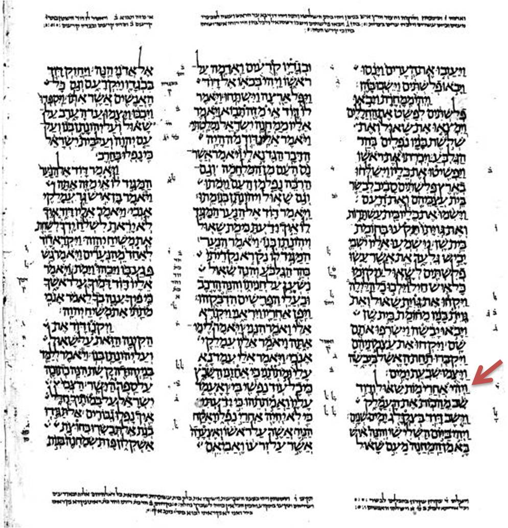 Leningrad Codex; page 341. Sam1-Sam2